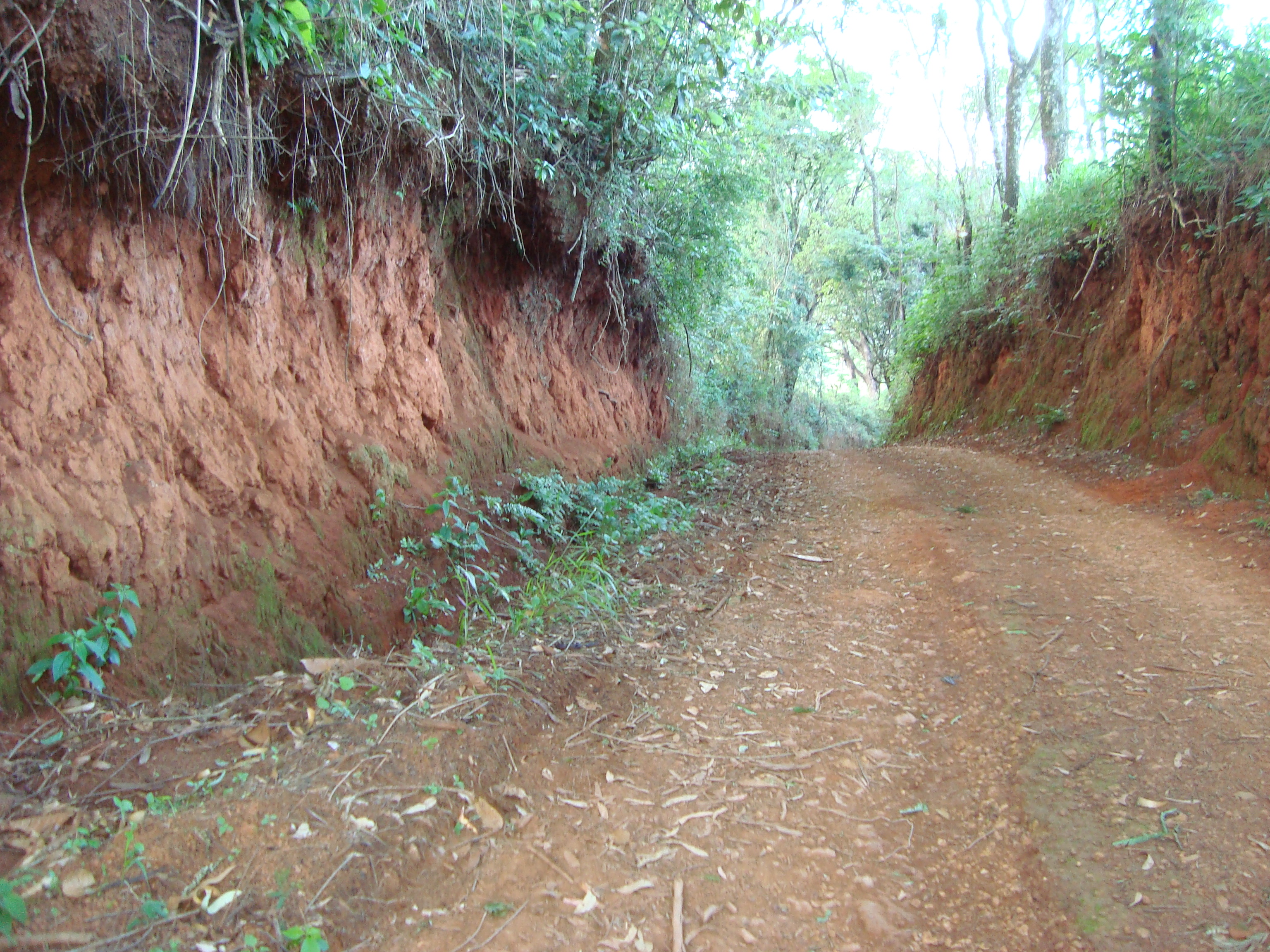 Horizonte A sobre horizonte B em LATOSSOLO de cerradão com raízes expostas. Município de Arapuá MG